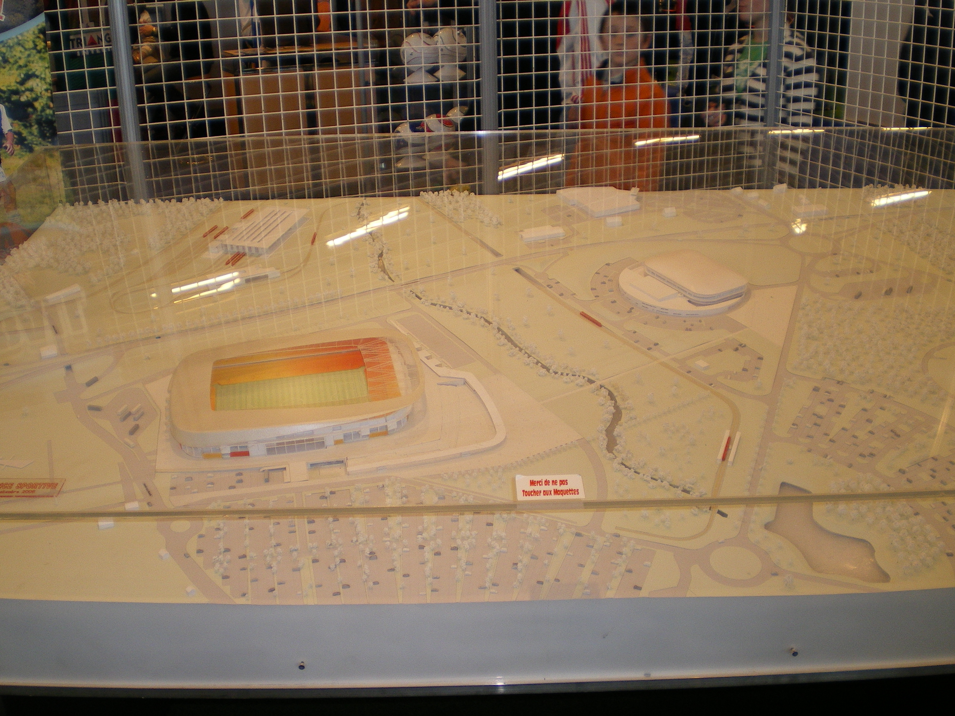 Maquette de la MMArena futur stade du MUC 72.